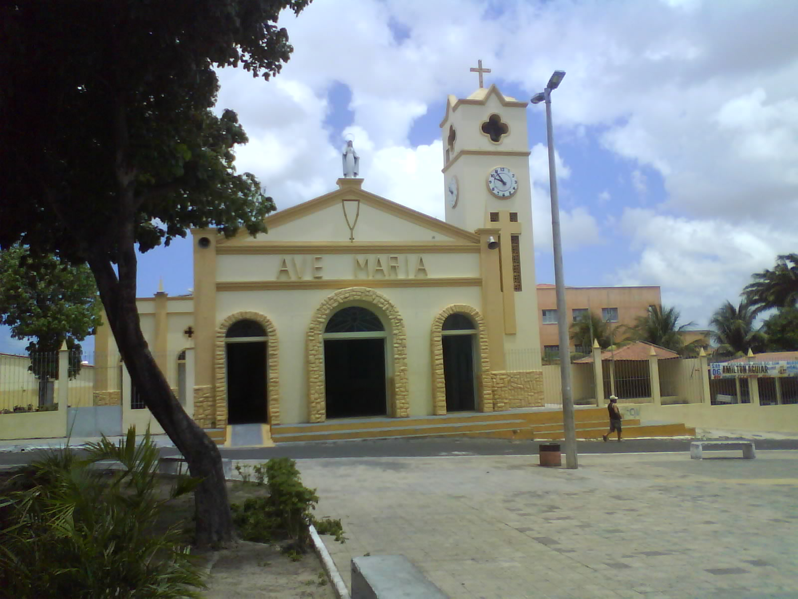 A igreja matriz do Henrique Jorge e áreas adjacentes